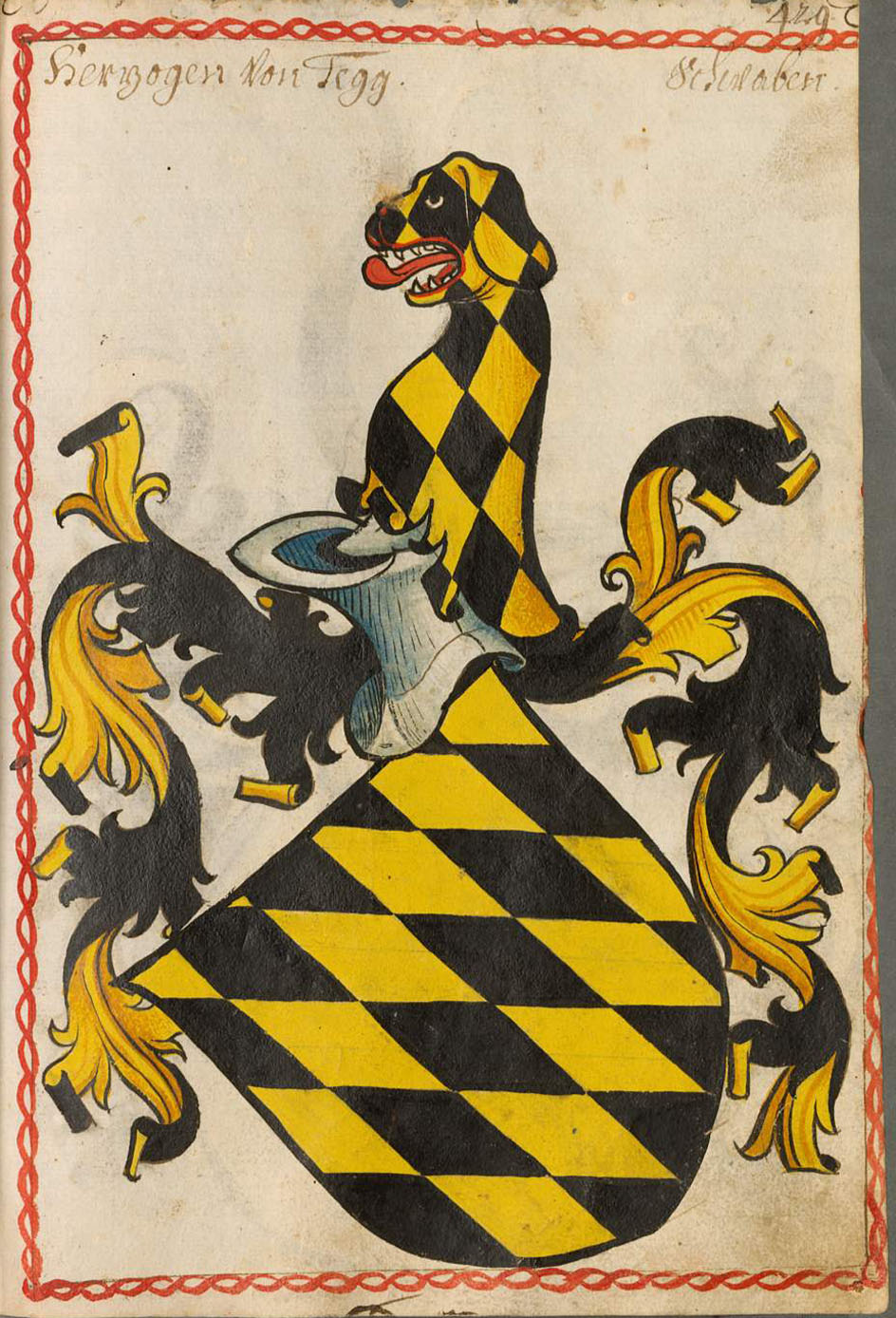 Scheibler'sches Wappenbuch , älterer Teil Herzöge von Teck